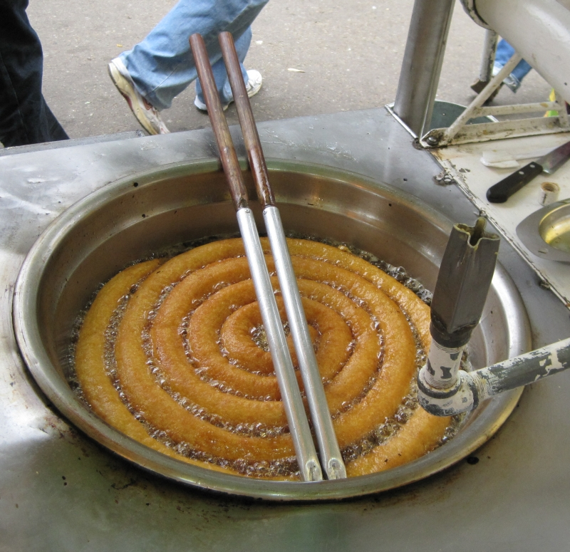 Churros en Guatemala.